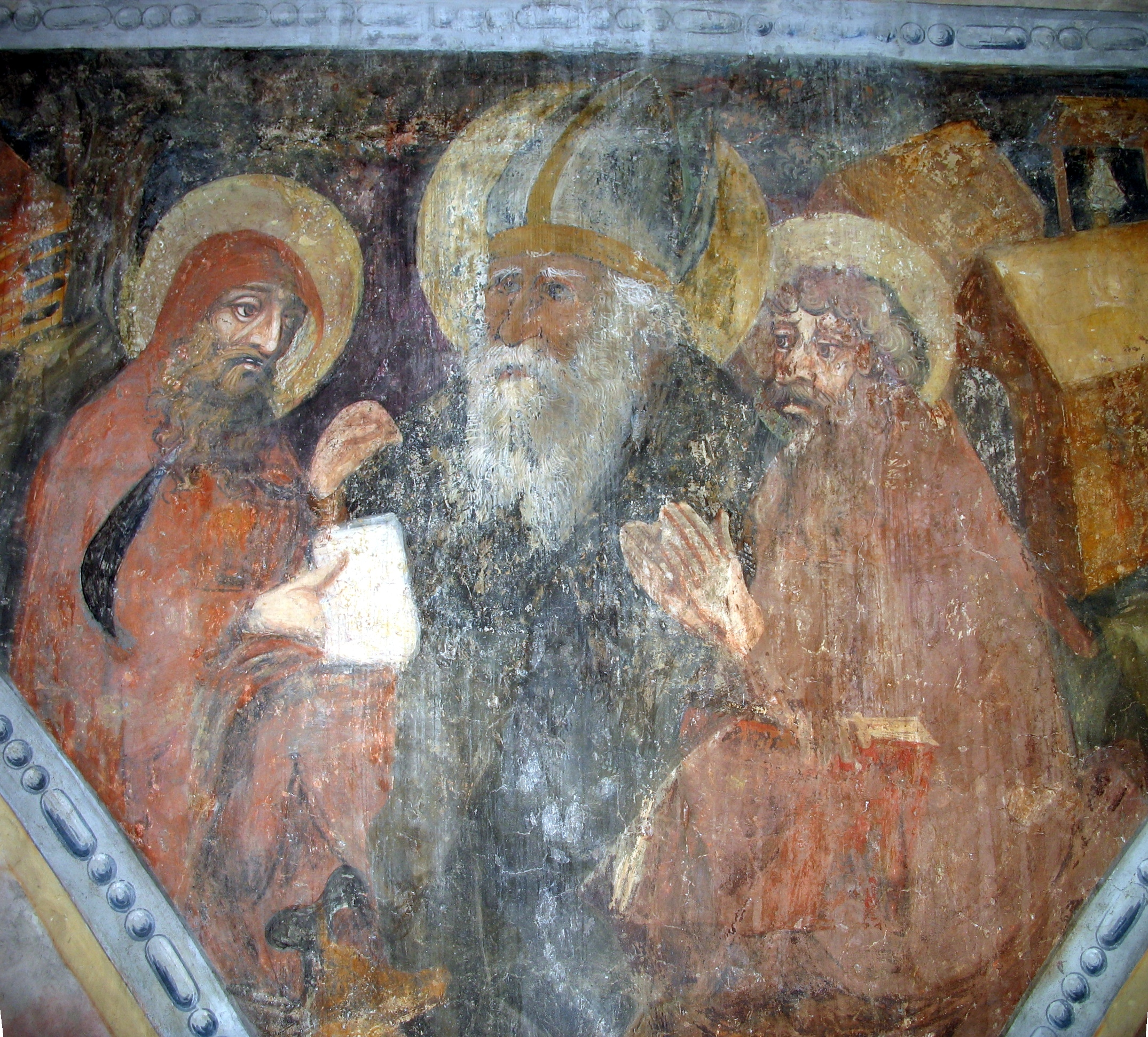 Konstanz, Dreifaltigkeitskirche, Fresko an der Südwand, Kirchenväter (?)